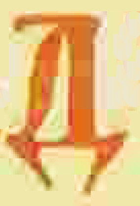 Журнал "Мир искусства"